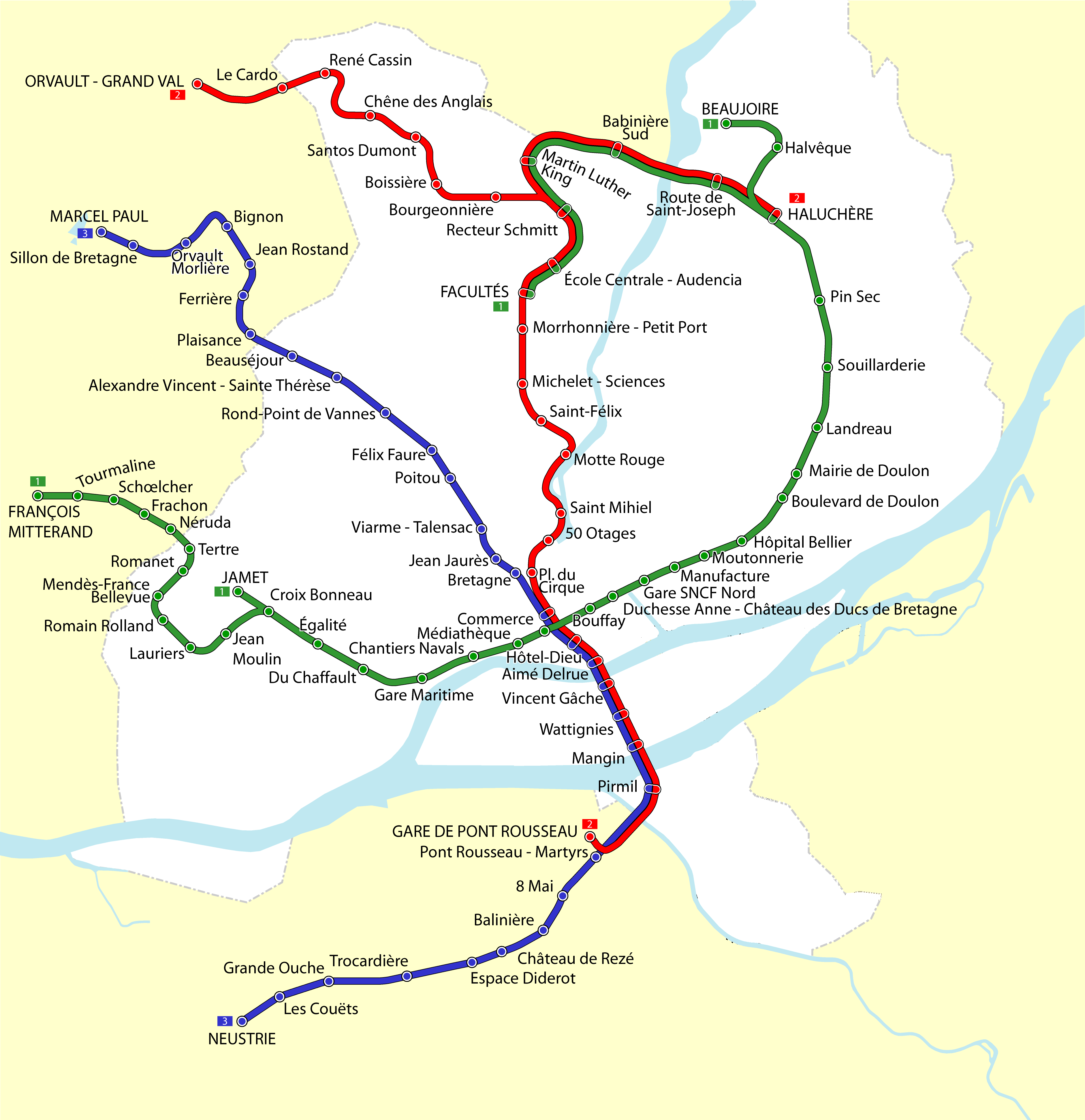 Plan du réseau de tram à Nantes en 2010